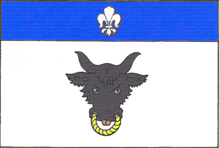 vlajka, Věchnov, okres Žďár nad Sázavou